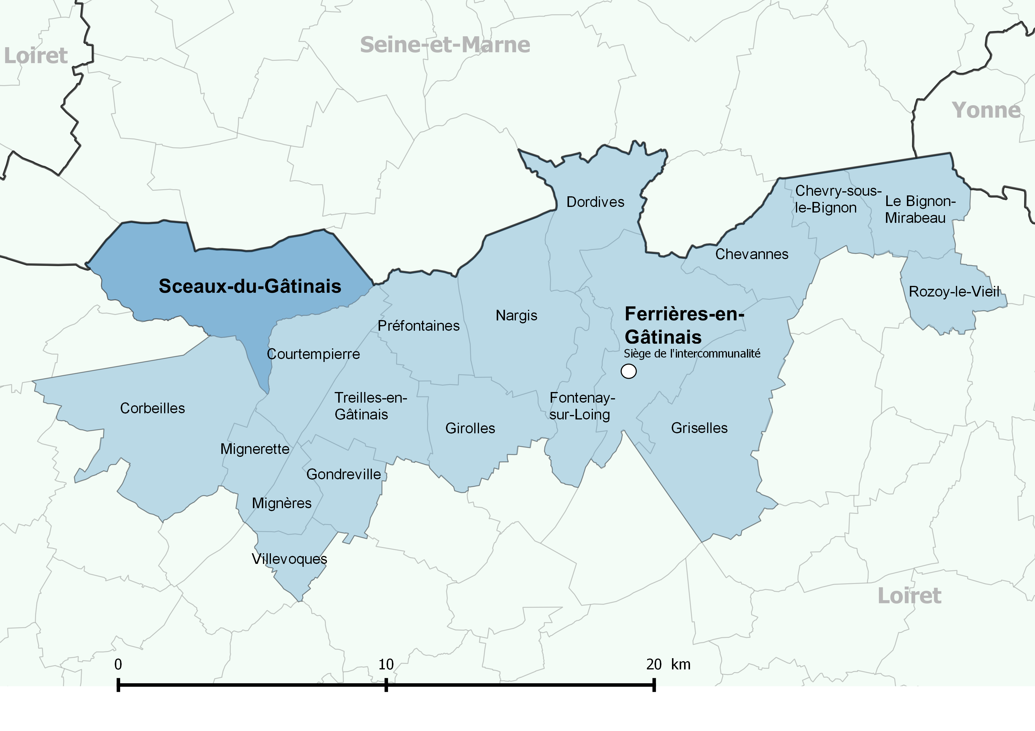 Périmètre de la communauté de communes des Quatre Vallées (Loiret) - Positionnement de la commune de Sceaux-du-Gâtinais